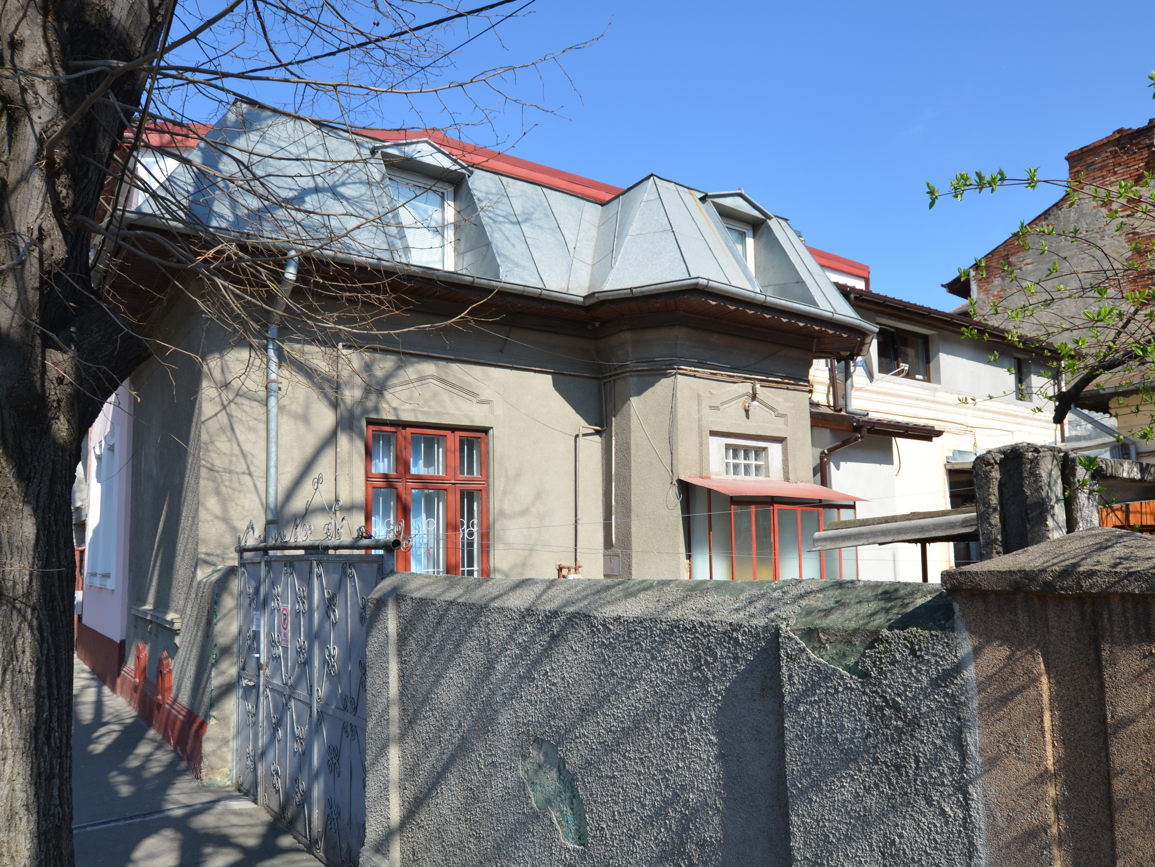 Casă, Str. Vlad Județul nr. 34